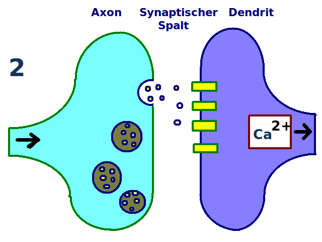 Langzeit-Potenzierung Zweite Stufe